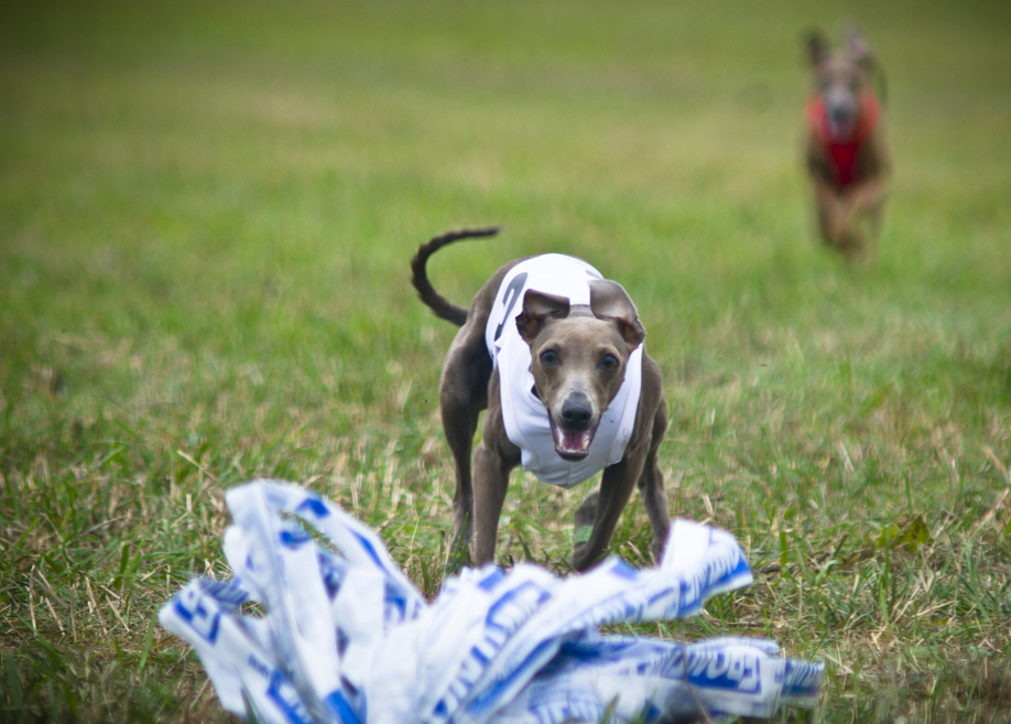 charcik włoski coursing